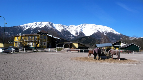 Schneeberg vu du Halmerhof